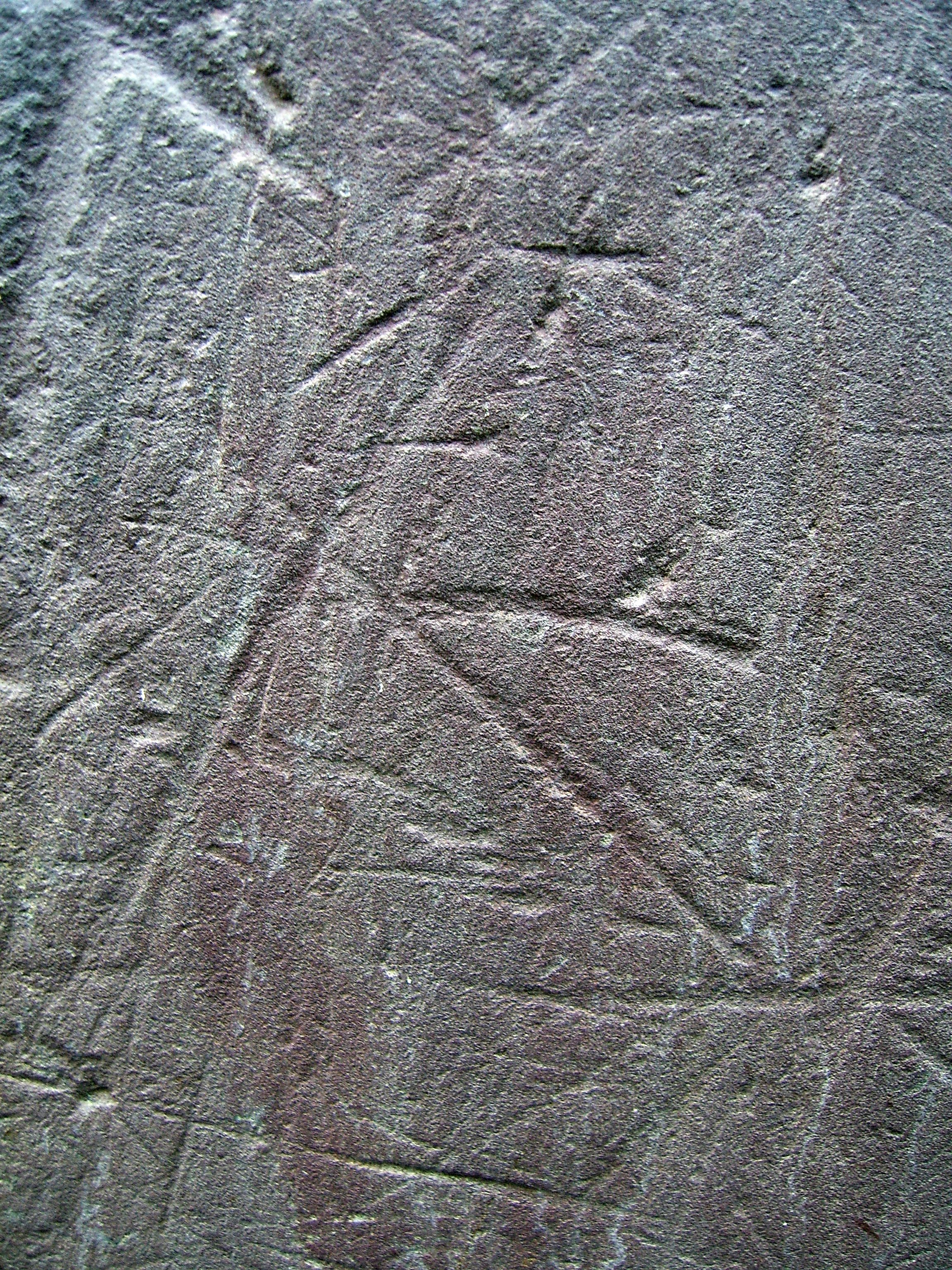 冰川擦痕，产于贵州遵义，现藏于中国地质博物馆